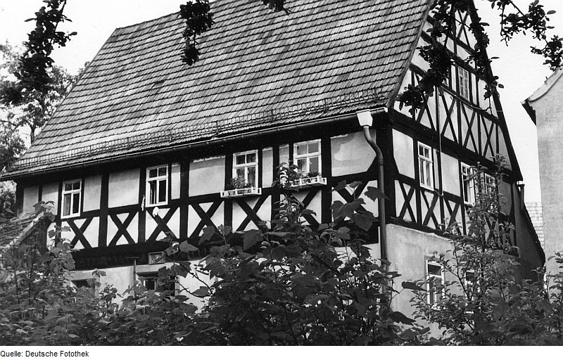 Original image description from the Deutsche FotothekTriebischtal-Taubenheim. Fachwerkhaus an der Kleinen Triebisch, unweit der Obermühle Taubenheim